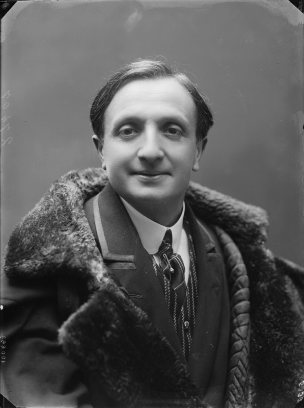 Ferruccio Garavaglia